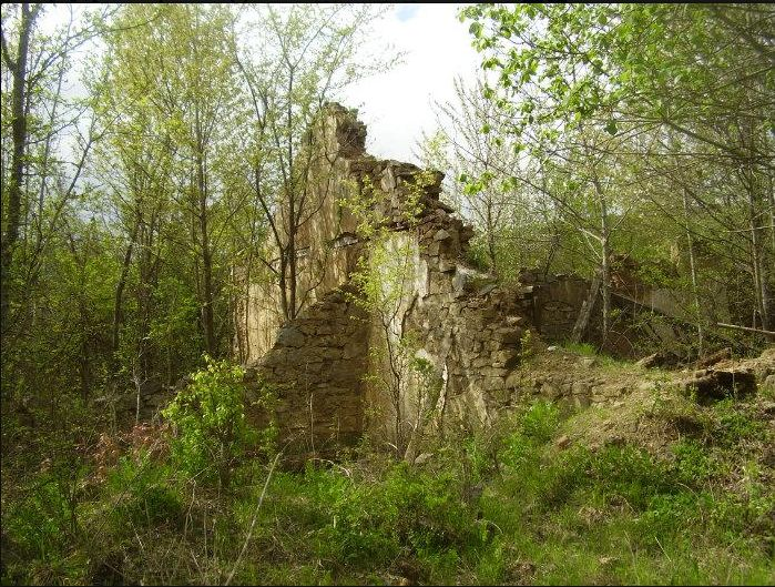 Руины бывшего села Шахты, Бахчисарайский район, Крым.